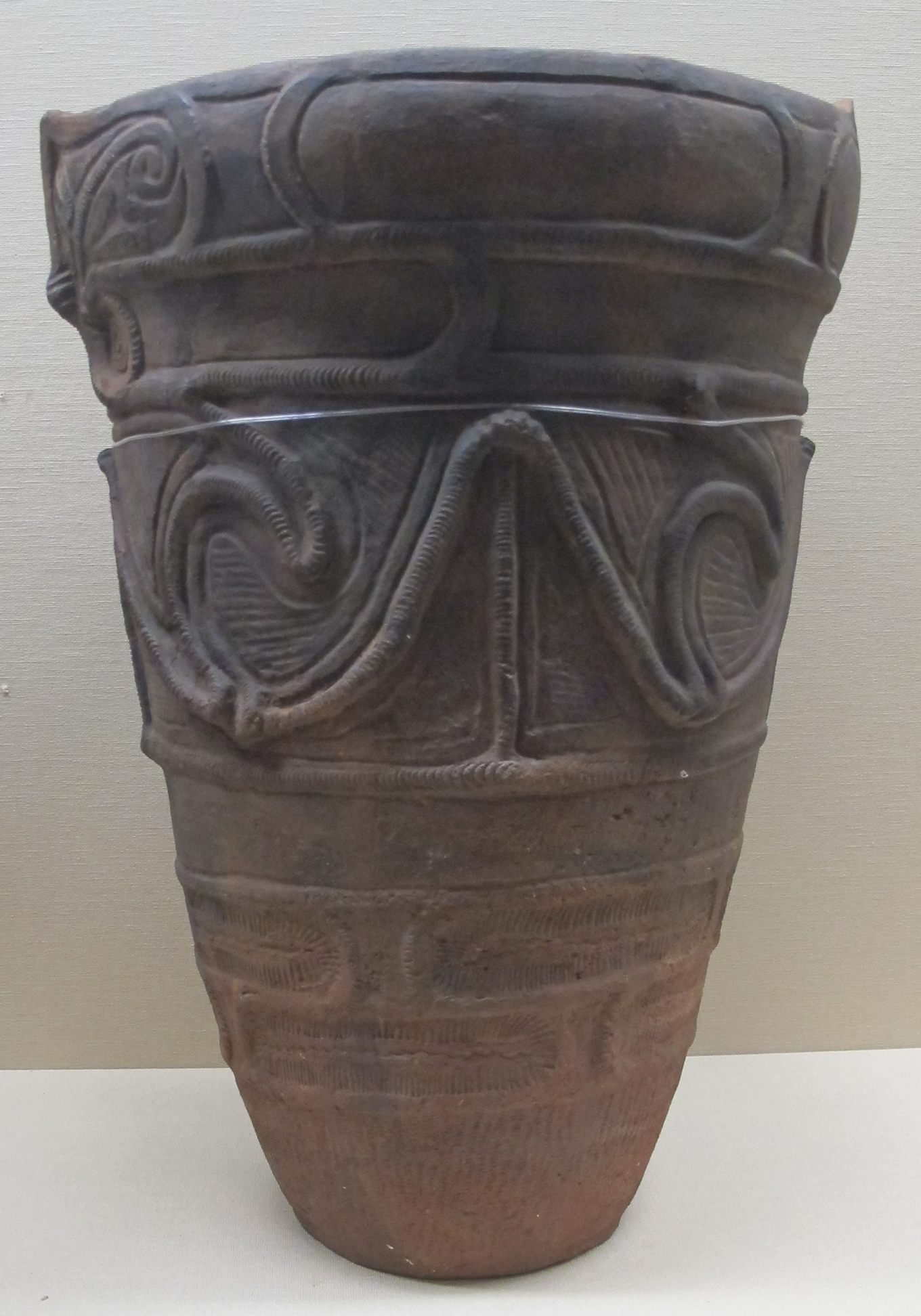 Periodo jomon medio, vasellame